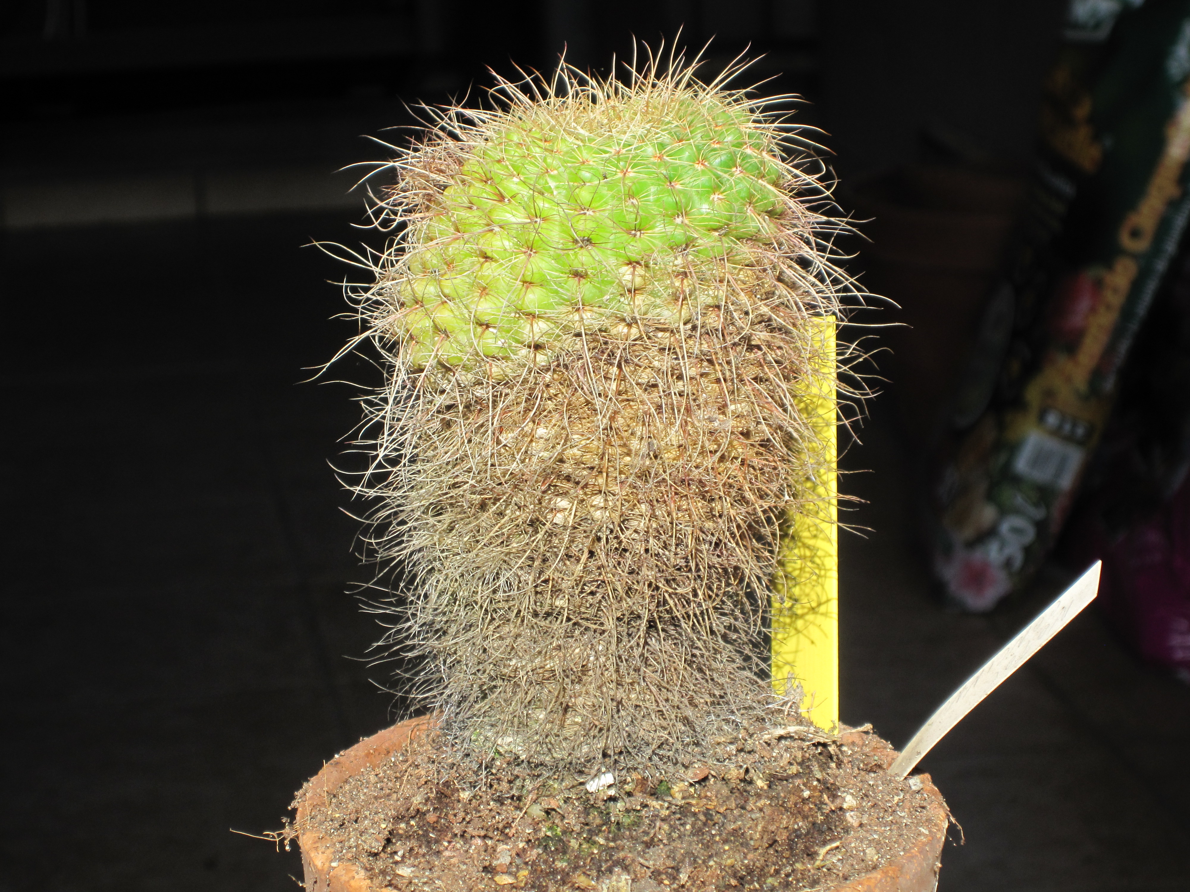 Una vecchia pianta di parodia concinna